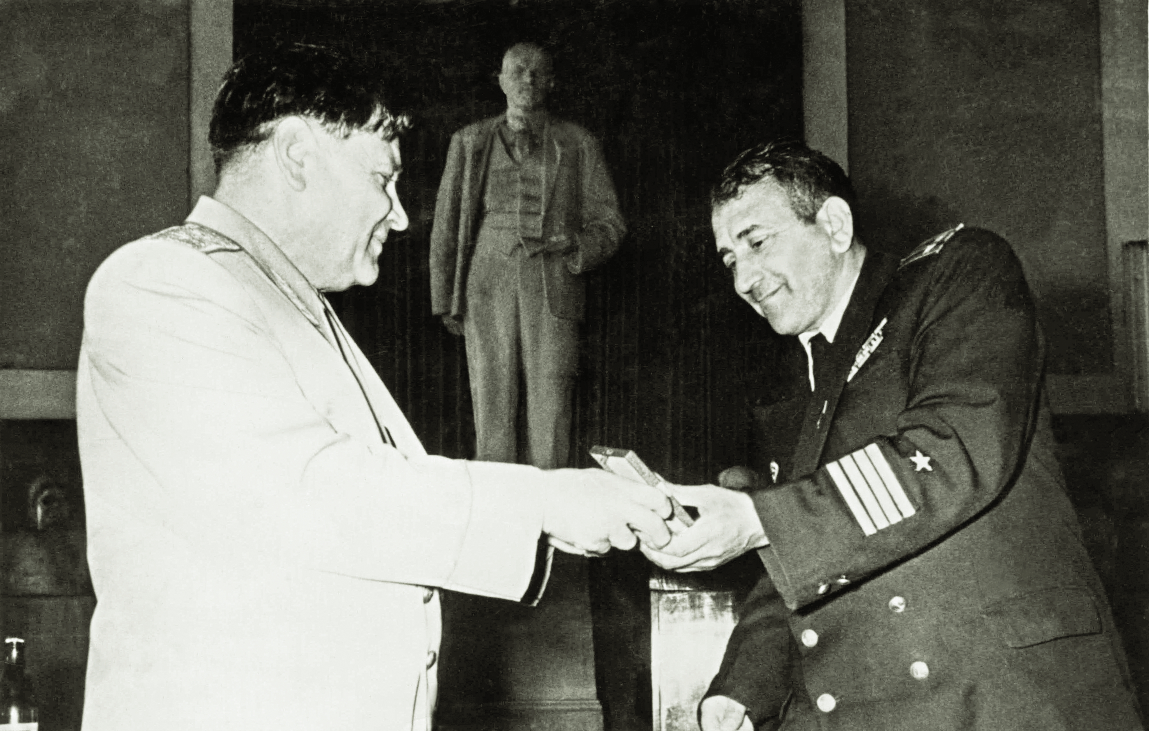 Cəlil Cavadov